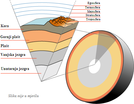 Struktura Zemlje